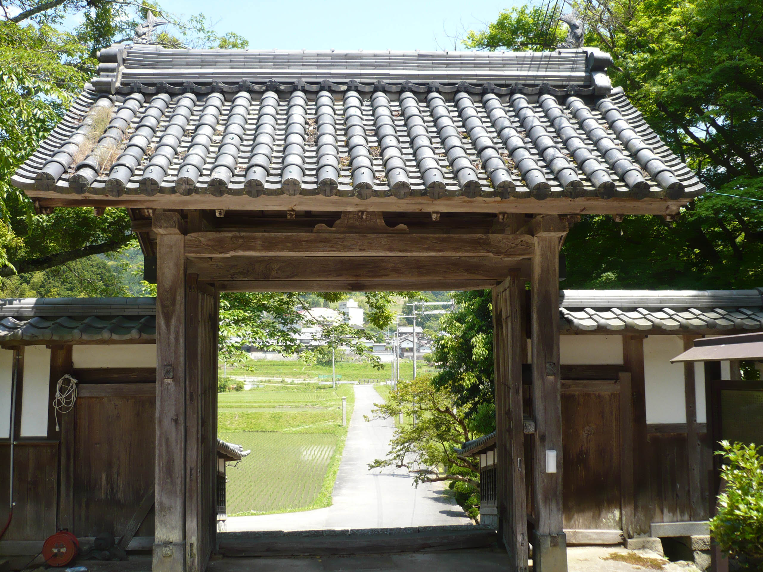 表門